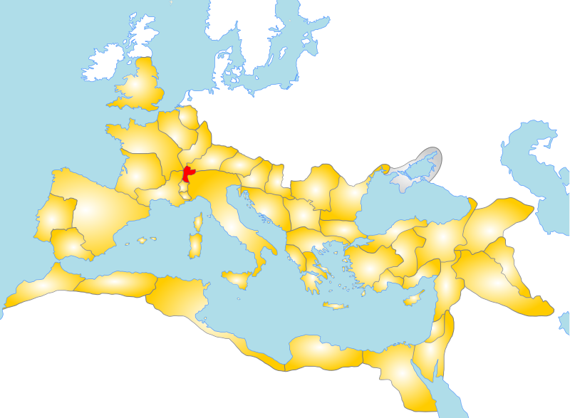 Пенински Алпи